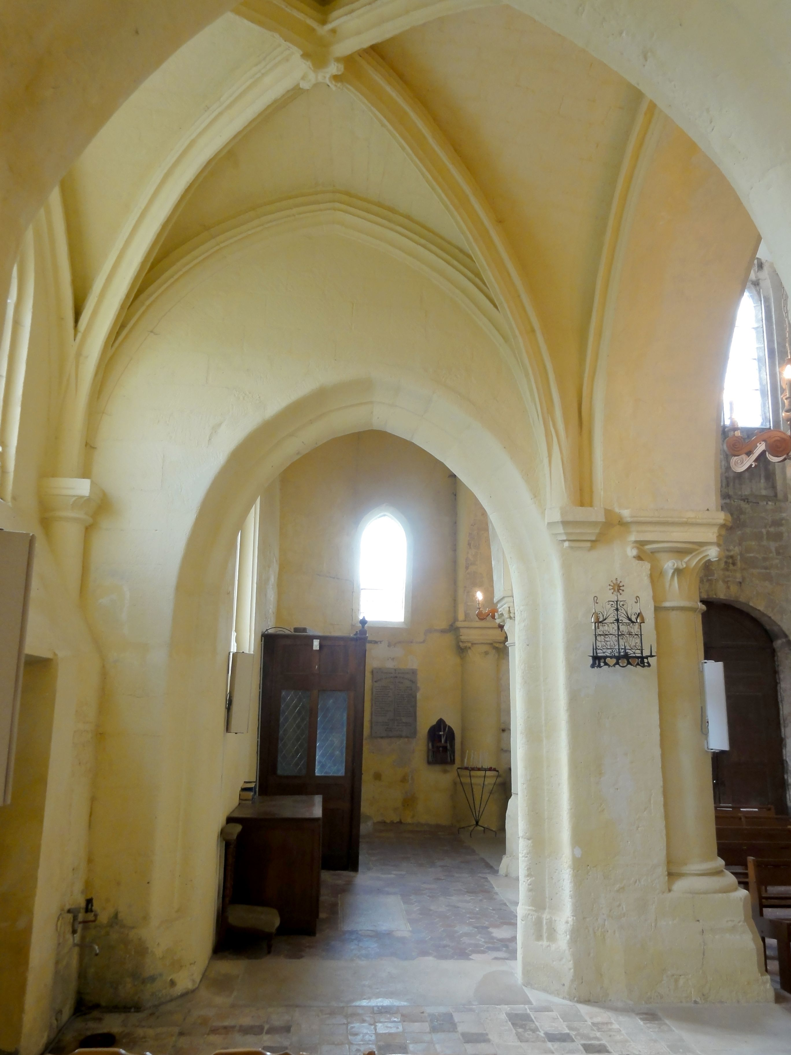 Bas-côté sud, vue vers l'ouest.